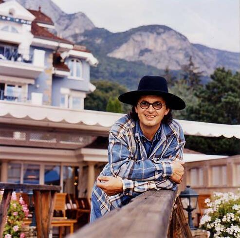 Marc Veyrat devant son auberge de Veyrier-du-Lac en Haute-Savoie - Grand chef cuisinier gastronomique cité 2 fois 3 étoiles Michelin et 20/20 au Gault-Millau